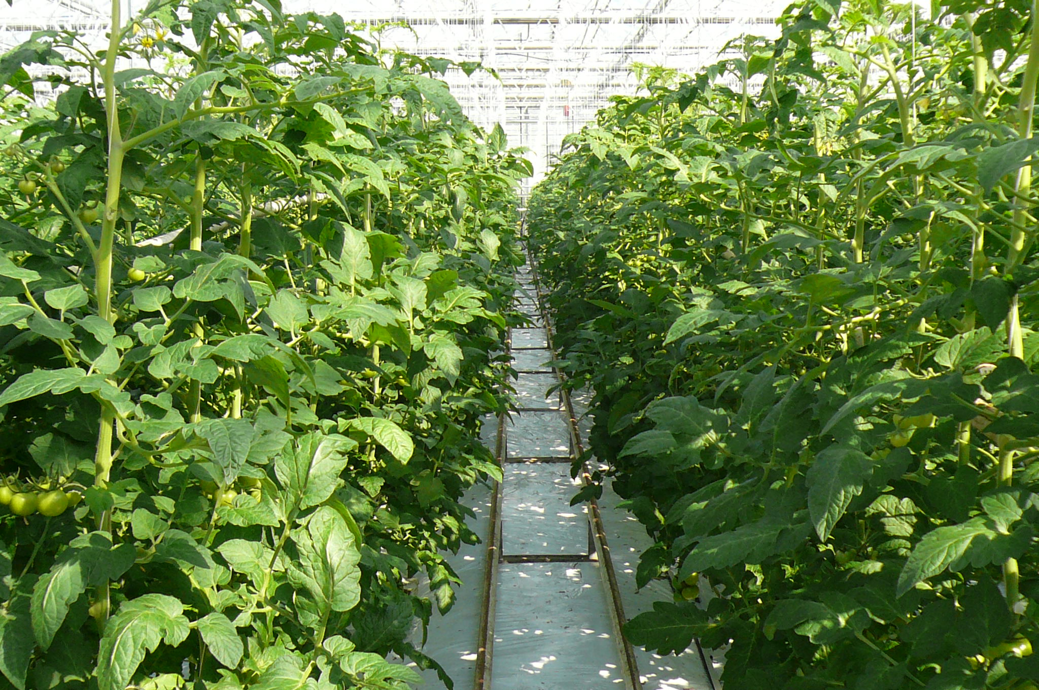 Tomatenproduktion unter Glas